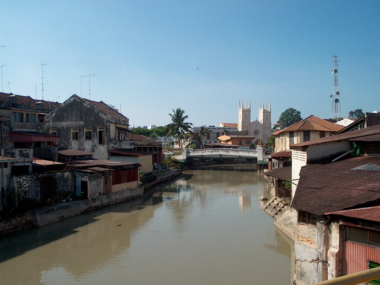 canals in Melaka